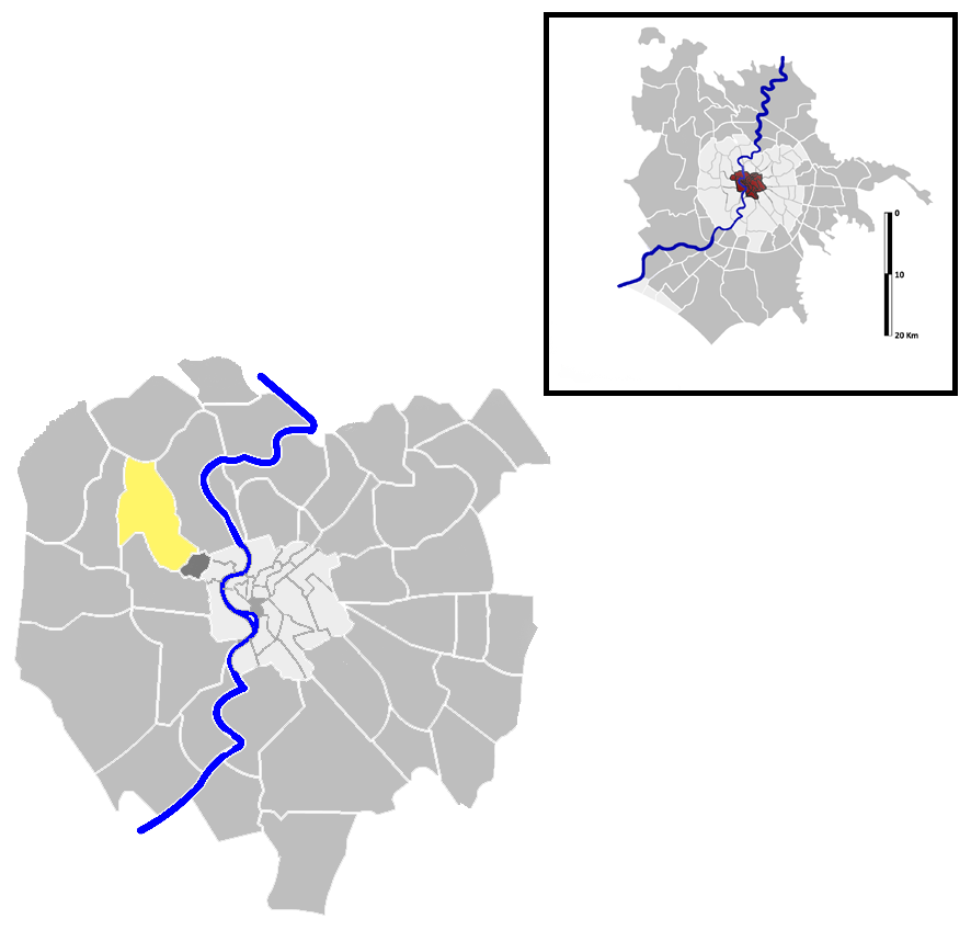 Trionfale